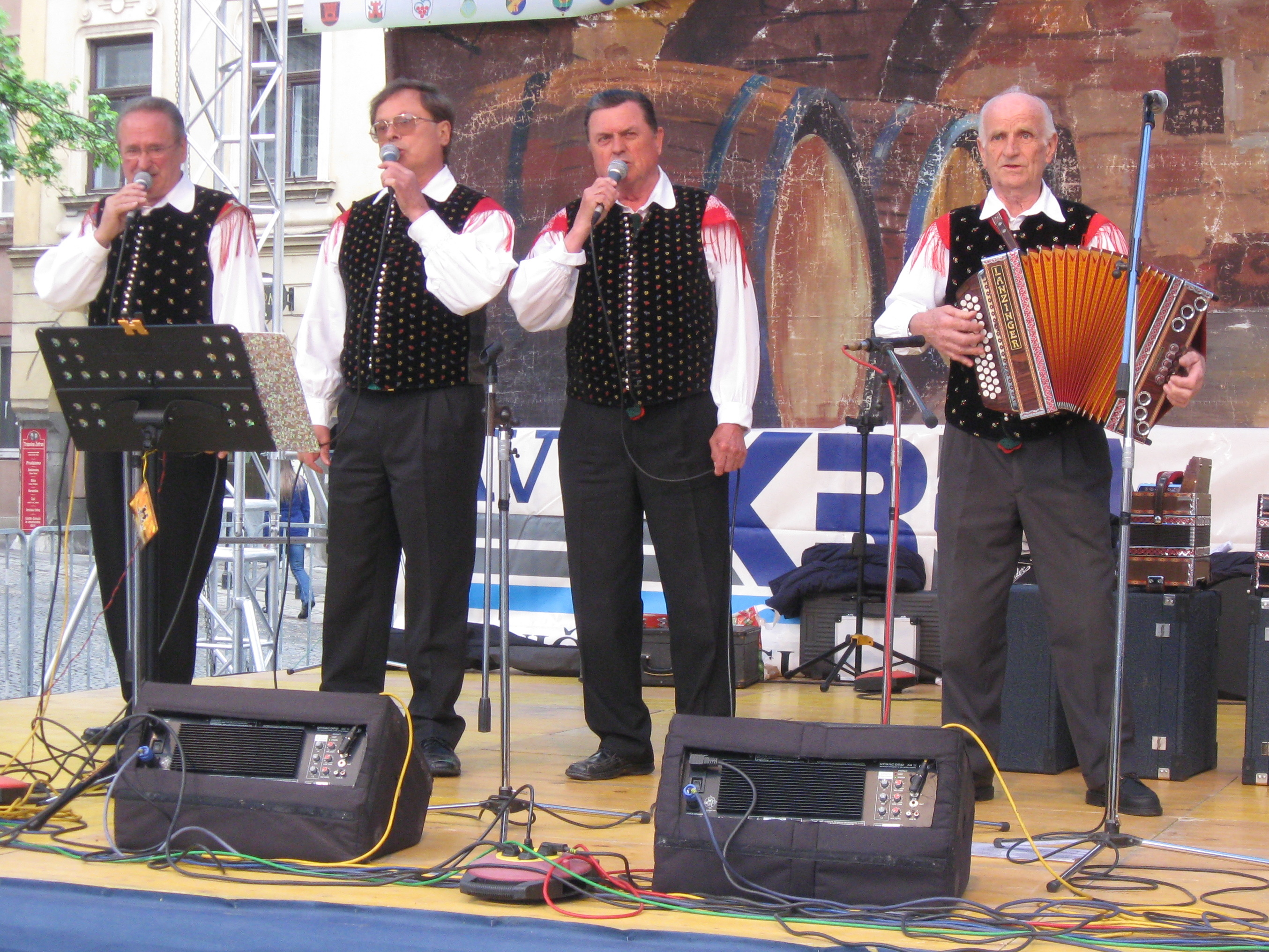 Fantje s Praprotna in Lojze Slak, Novo mesto